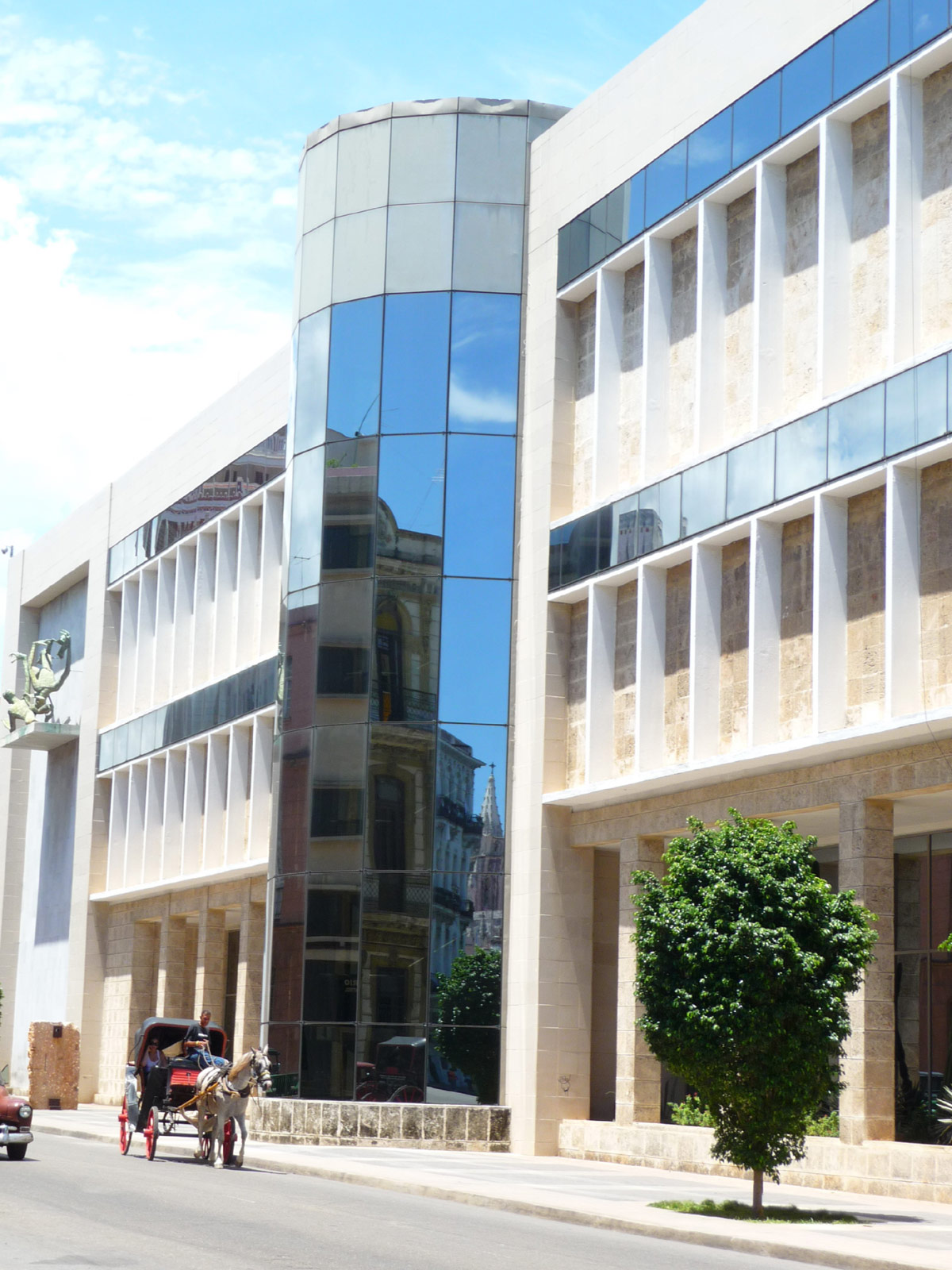 Palacio de Bellas Artes, La Habana, Cuba.